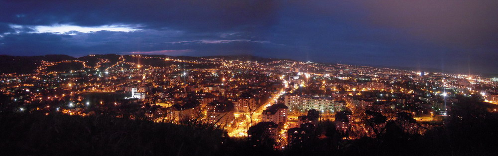 Banja Luka